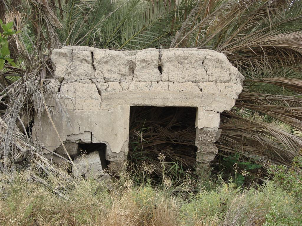 בית קופ - טירת צבי - 1